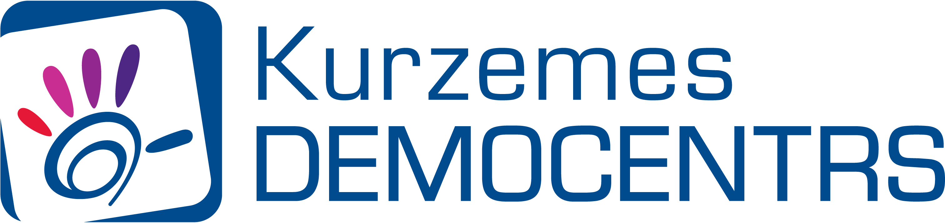 Kurzemes Democentra logo